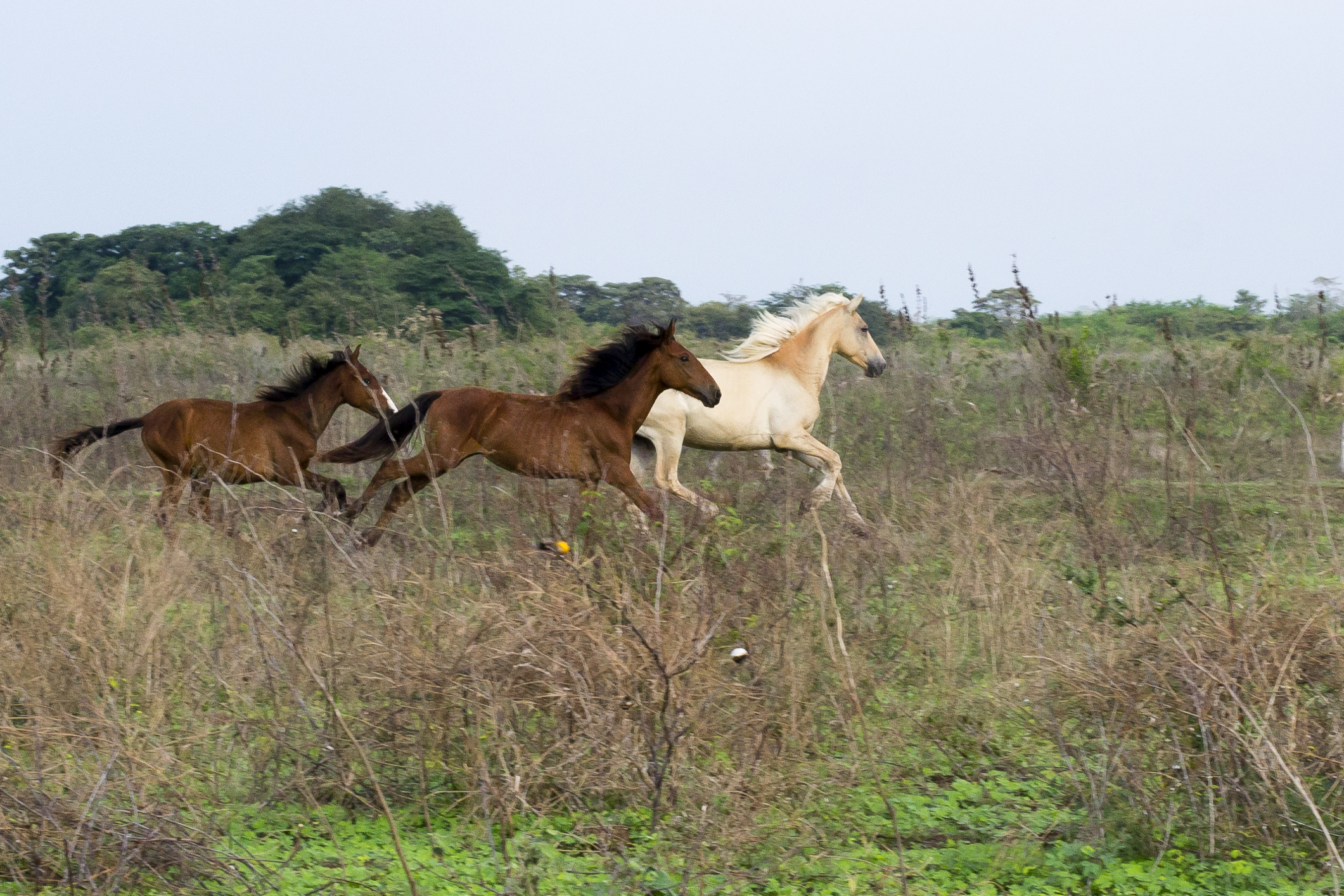 Barinas, Venezuela